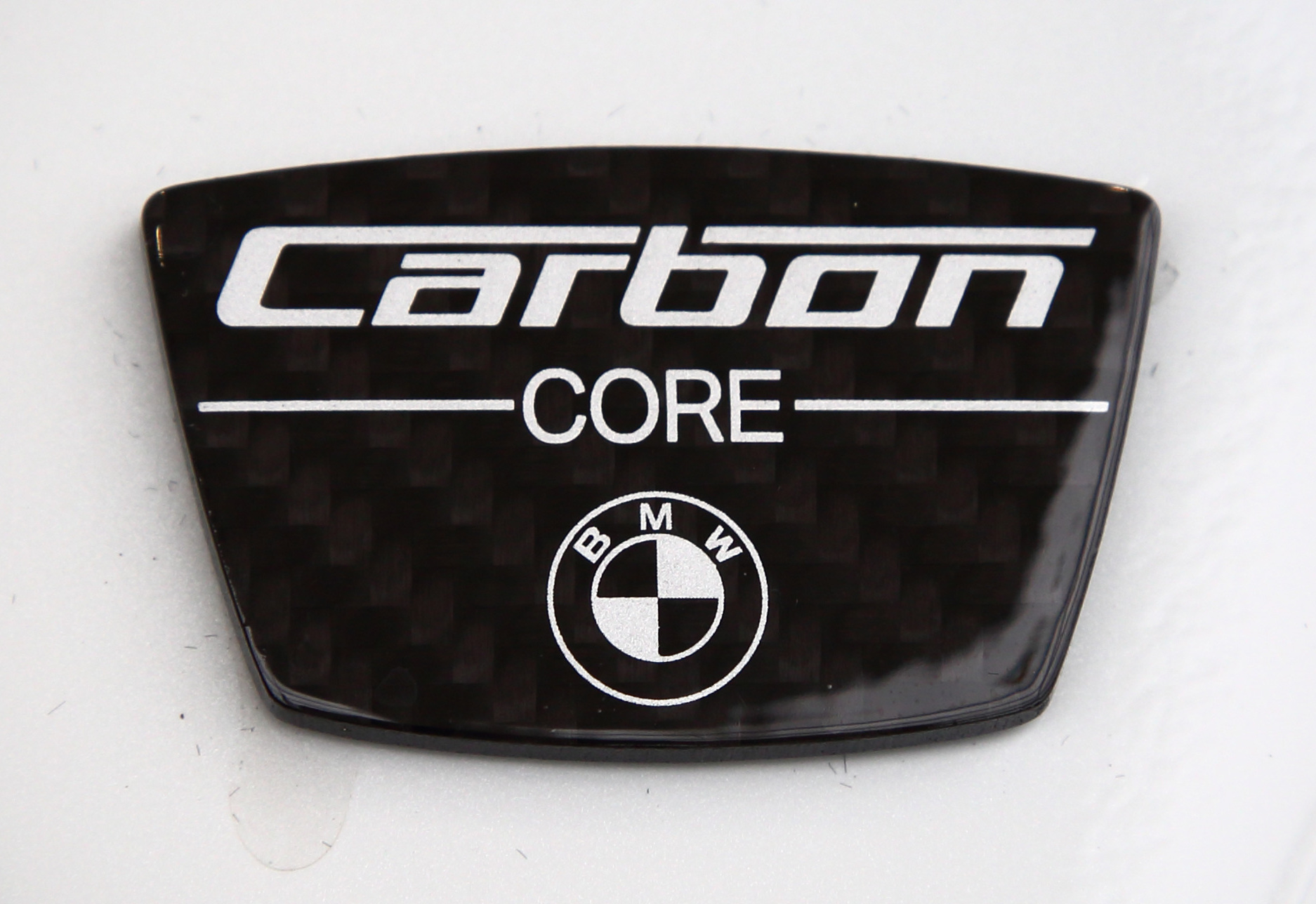 6代目BMW BMW・7シリーズ#6.E4.BB.A3.E7.9B.AE_G11.2FG12.EF.BC.882015.E5.B9.B4-_.EF.BC.897シリーズ]に採用されている「カーボン・コア」構造のエンブレム。 ※ Bピラー上部に所在。